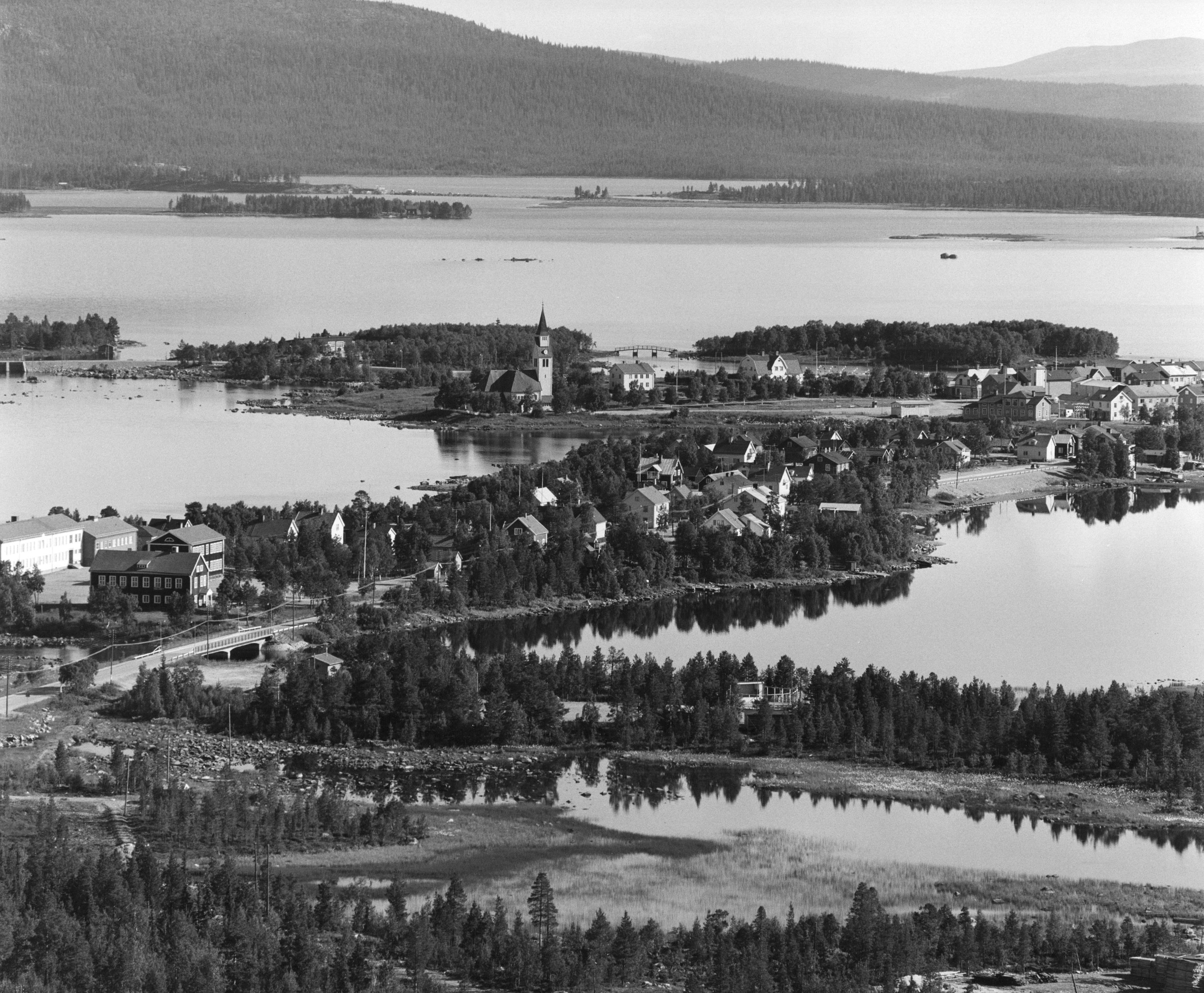 Arjeplogs kyrka i bildens mitt. Bilden troligen från början av 1960-talet. Motiv: Arjeplog Kategori: Insjömiljöer Arjeplogs kyrka i bildens mitt. Bilden troligen från början av 1960-talet.